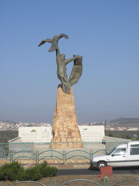 האנדרטה לזכר הרוגי הסכסוך מכפר עראבה.